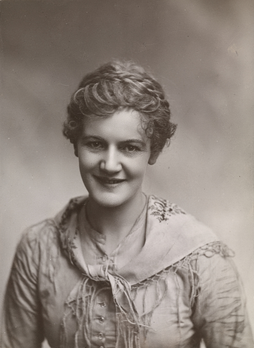 Aagot Didriksen, portrett, kvinne, skuespillerinne, brystbilde.